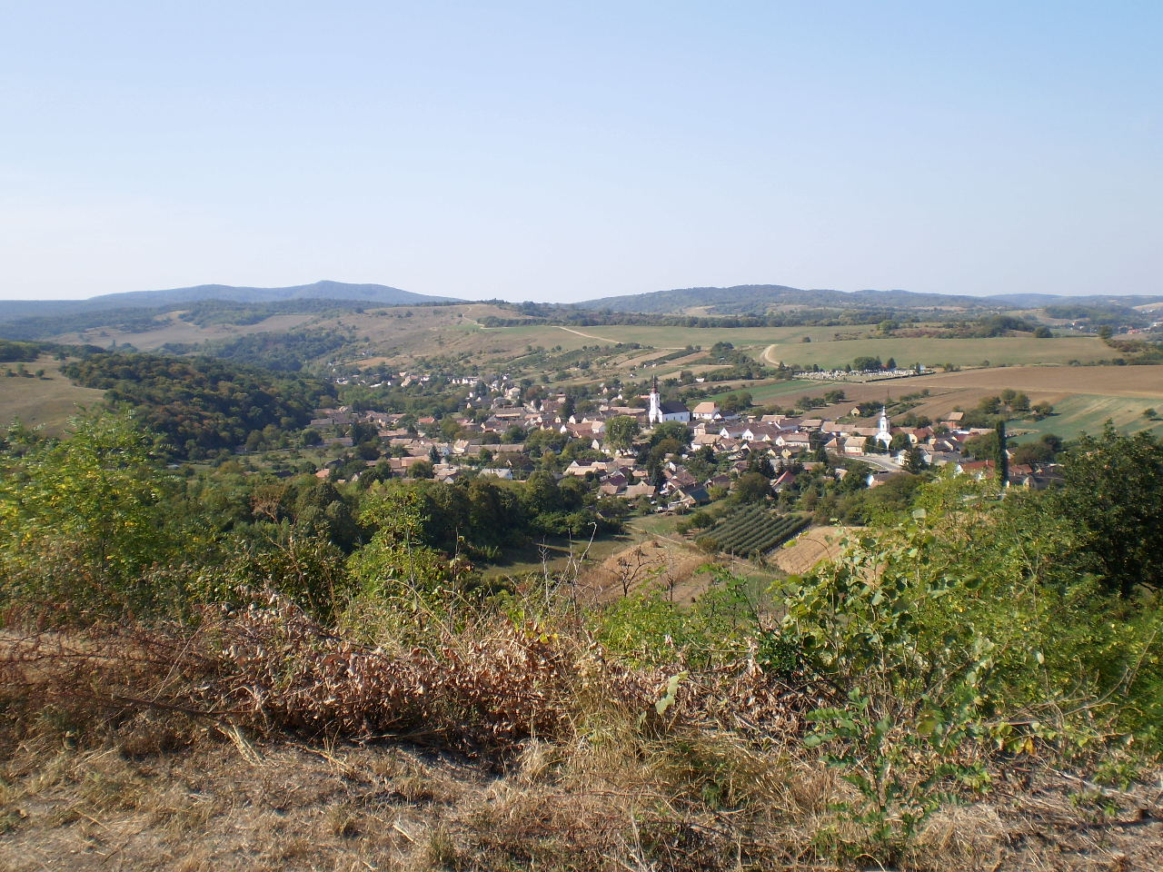 Váralja látképe a Várfő-hegyről (Tolna megye)